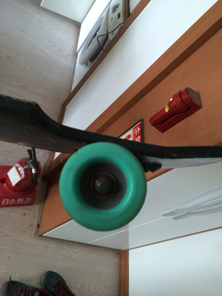 내 보드임